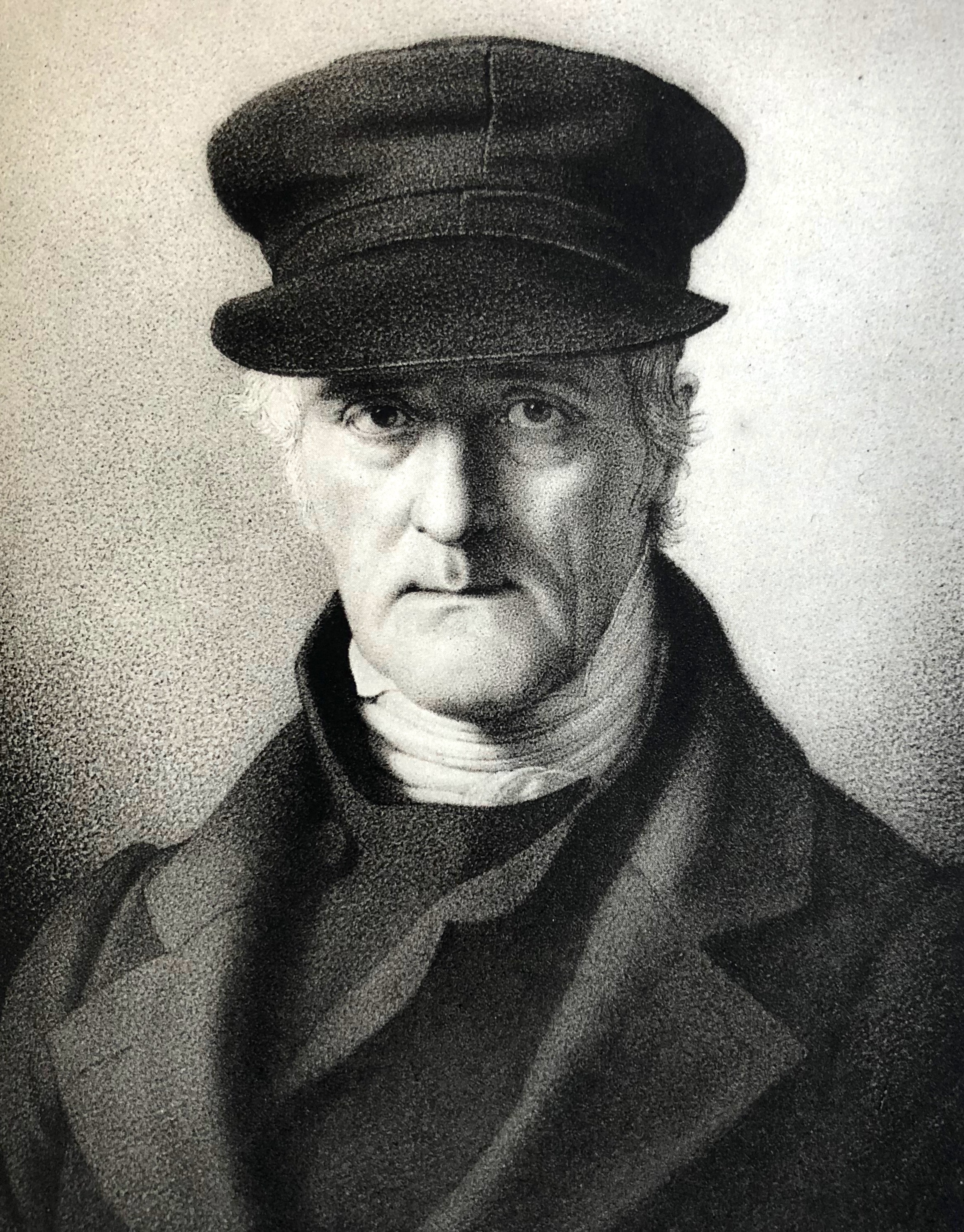 Portrait des Schweizer Verlagsgründers Johannes Schulthess